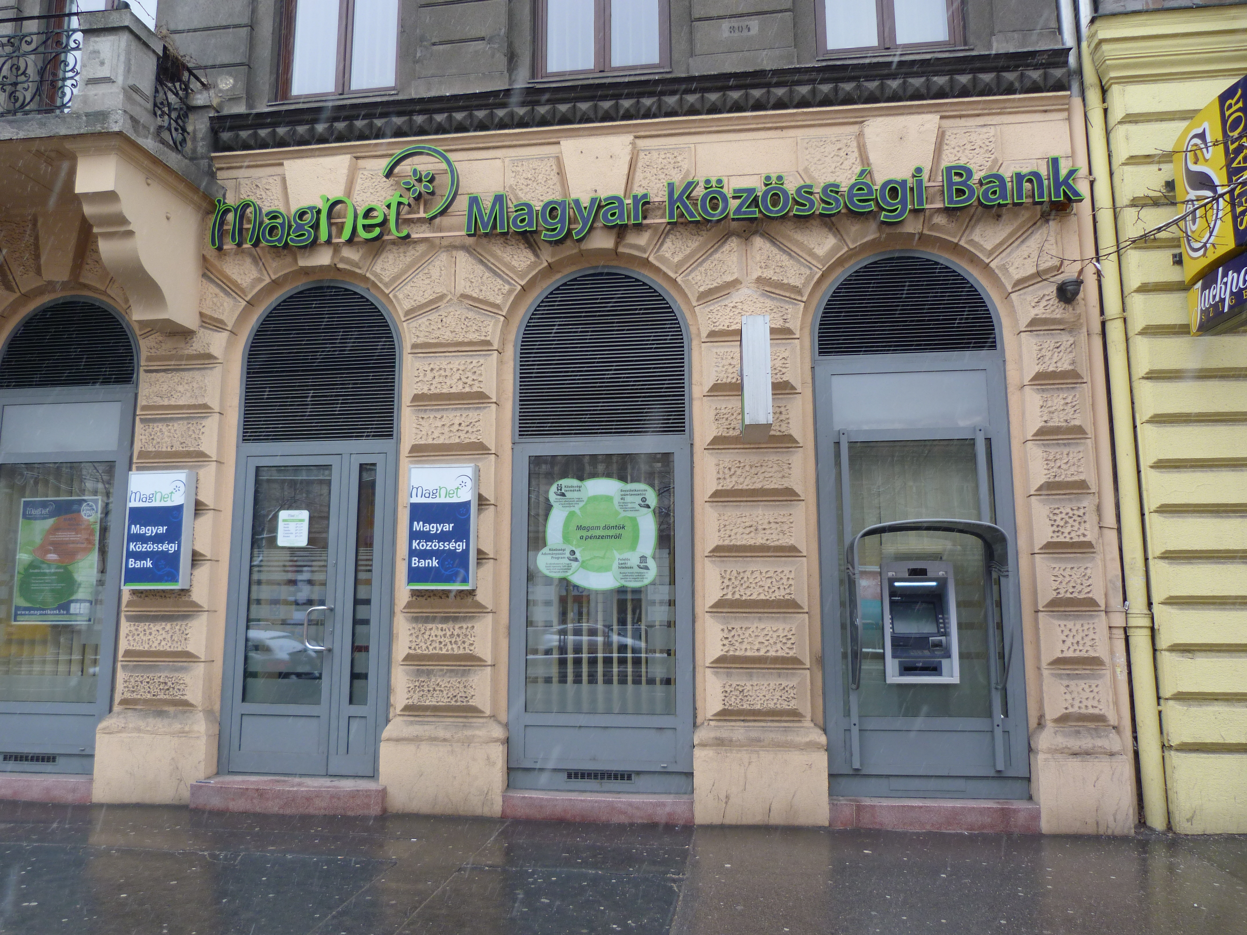 A felvétel 2013. Január 28 –án készült Budapesten, a József körúton. A 72 szám alatt a Magnet Magyar Közösségi Bank. ©© Megjelent Creative Commons alatt a Metapolisz sorozatban. A Metapolisz sorozat valamennyi képe és filmje Creative Commons alatti valamint kereskedelmi - for profit - célra is felhasználható. Ajánlott hivatkozás: Derzsi Elekes Andor: Metapolisz DVD line